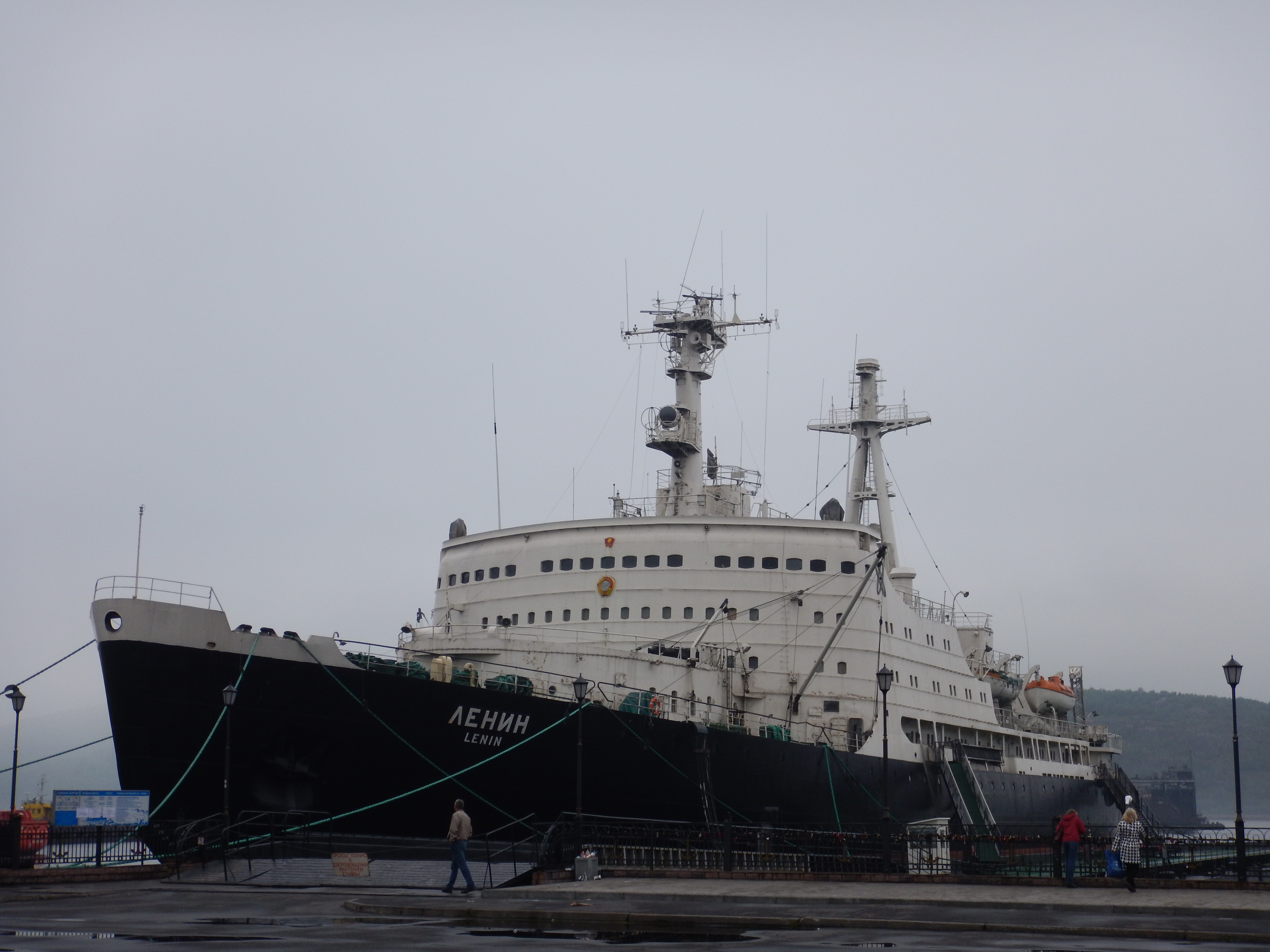 Атомный ледокол «Ленин»: проезд Портовый, 25. Пирс около морского вокзала, Мурманск, Мурманская область